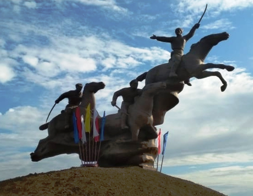 Памятник Б.М. Думенко: Казачий, Весёловский район, Ростовская область